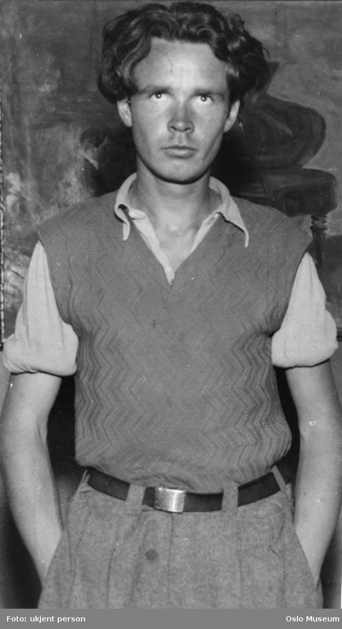 Geirr Tveit. Ukjent fotograf (ca. 1935–40). Fra Byhistorisk samling hos Oslo Museum.